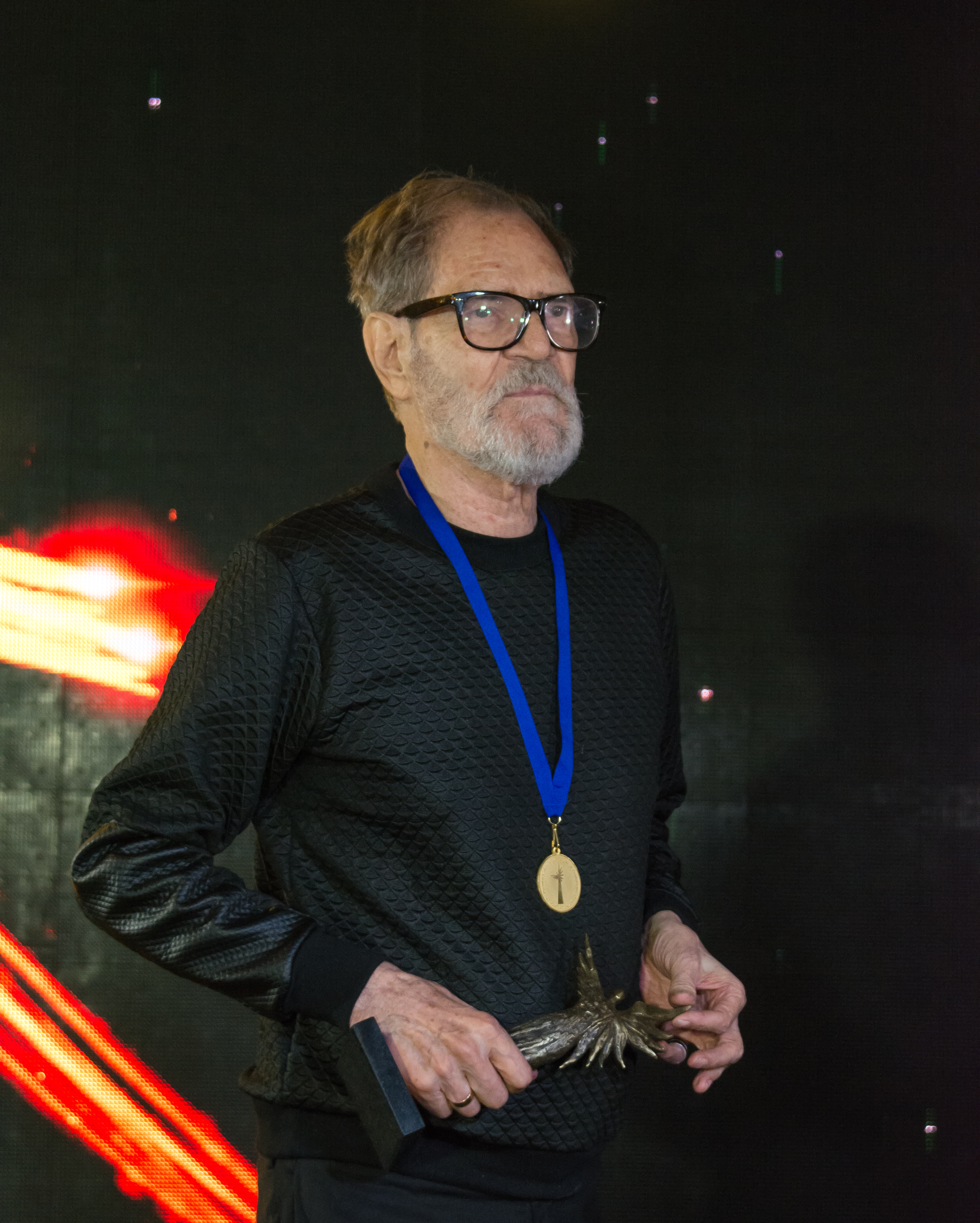 Alejandro Sieveking, Premios Caleuche, Teatro Oriente, Providencia, Santiago, Región Metropolitana de Santiago, Chile.